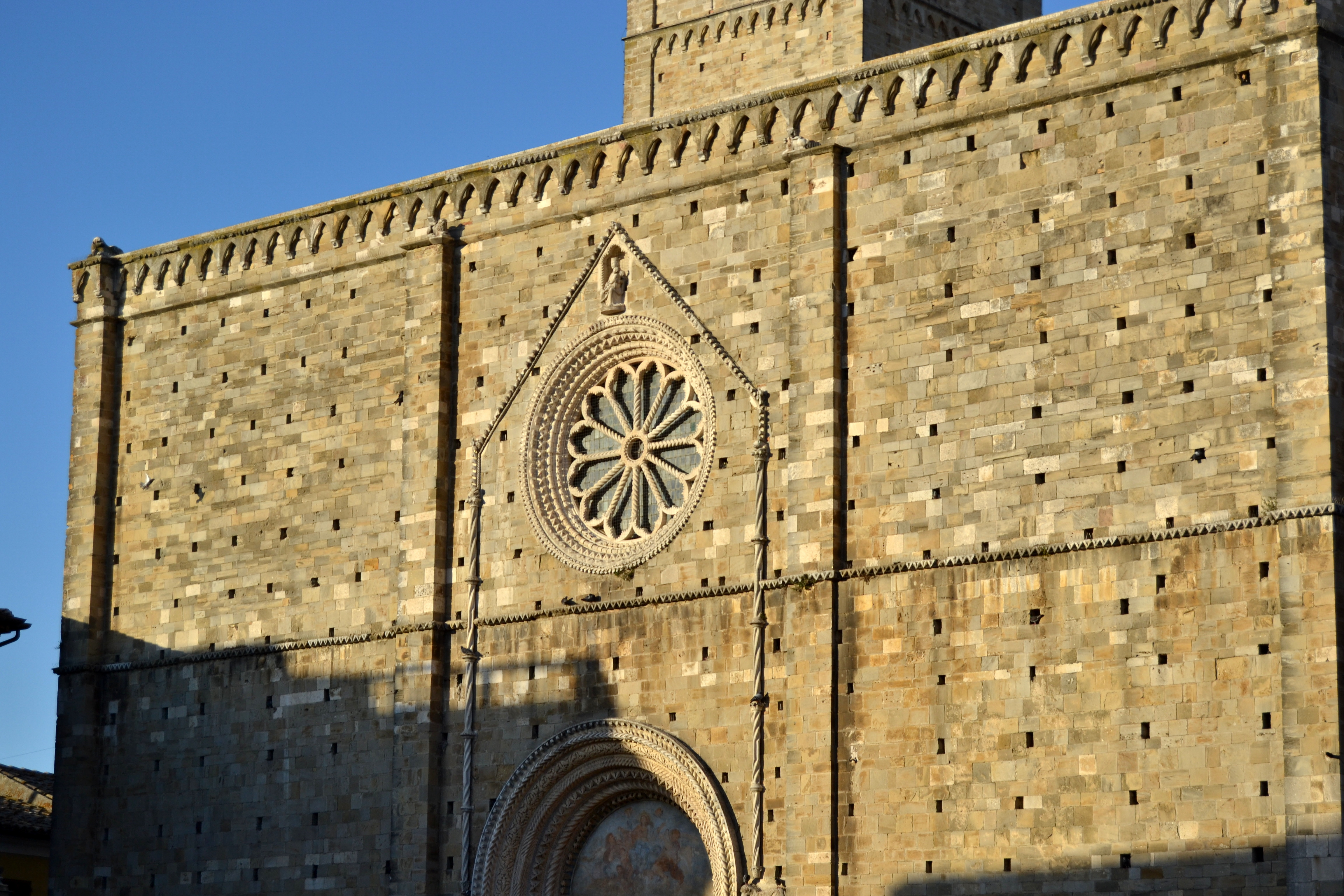 Concattedrale di Atri, dettaglio facciata